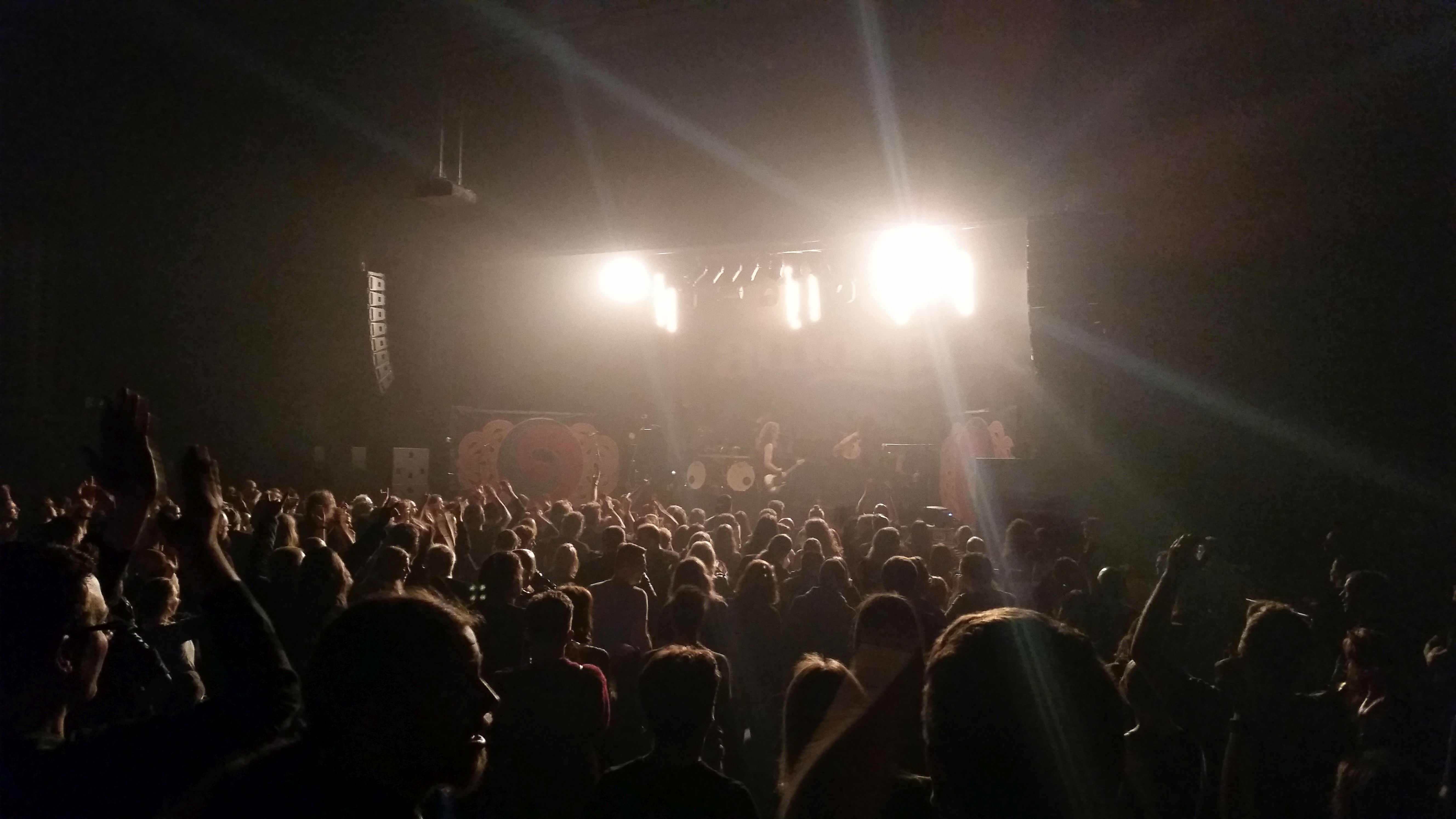 Amorphis în Sala Trix din Antwerpen, pe 16 aprilie 2016.